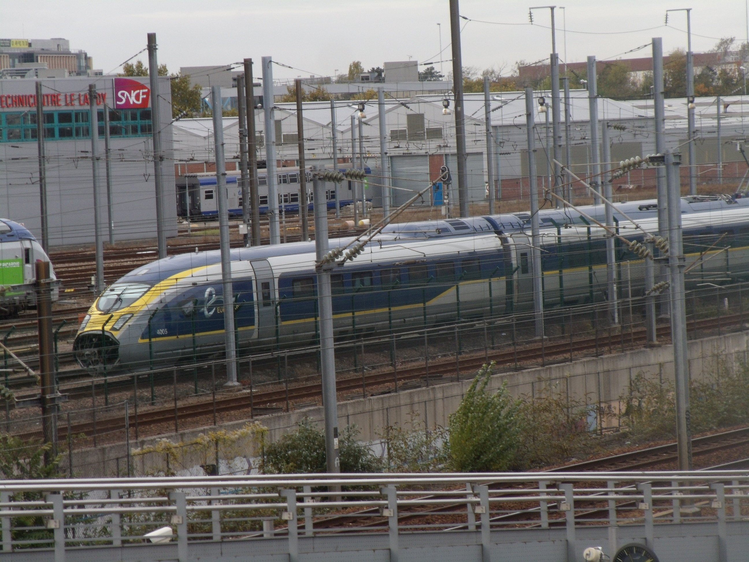 L'Eurostar 4005 au Landy le 8 novembre 2014. Photo prise depuis la gare du Stade-de-France - Saint-Denis